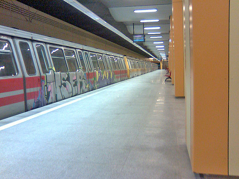 Quai et desserte de la station.